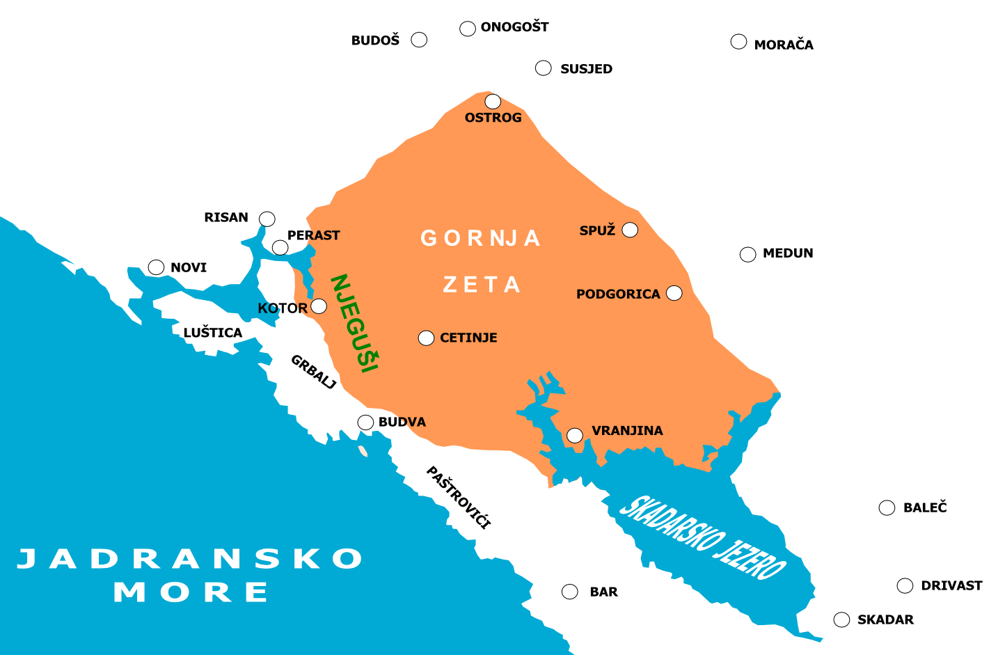 Katun Njegusi u Gornjoj Zeti XV vijeka